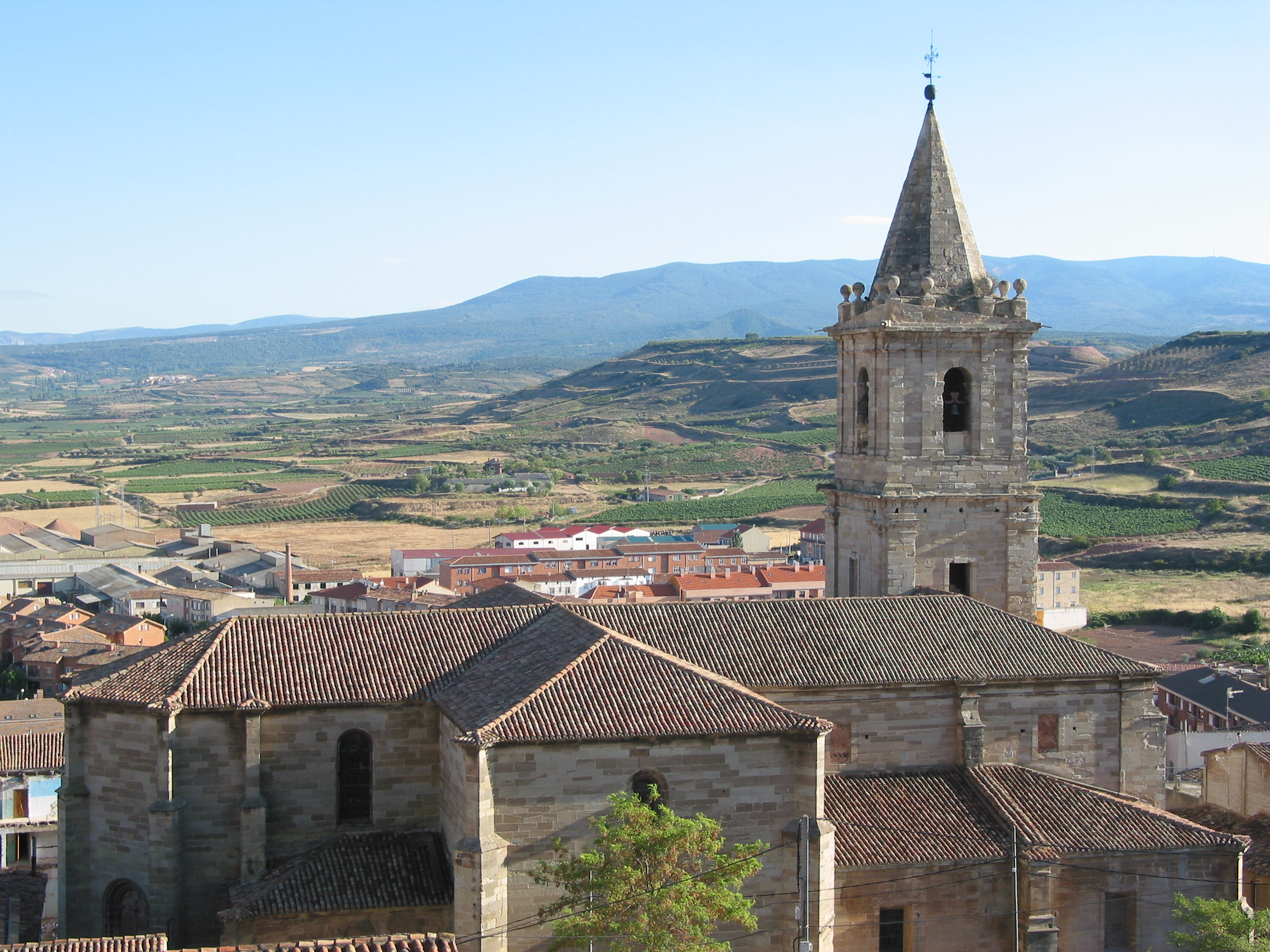 Iglesia parroquial de la Asunción de María (Navarrete) vista desde el mirador del Cerro Tedeón